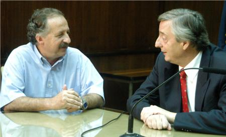 Néstor Kirchner recibe a Hugo Yasky en la Casa Rosada